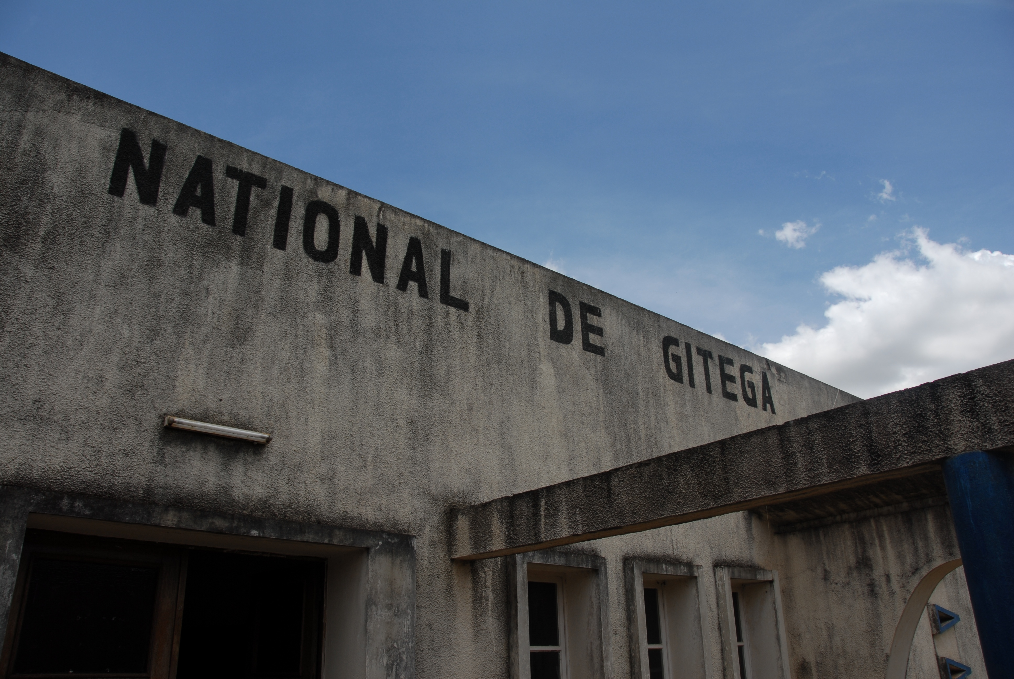 Burundi National Museum at Gitega